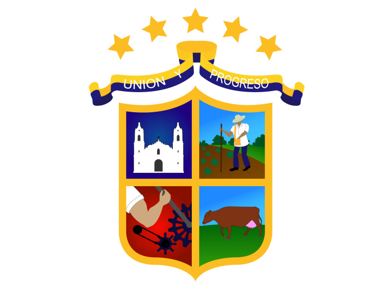 Escudo de la ciudad de Chitré.